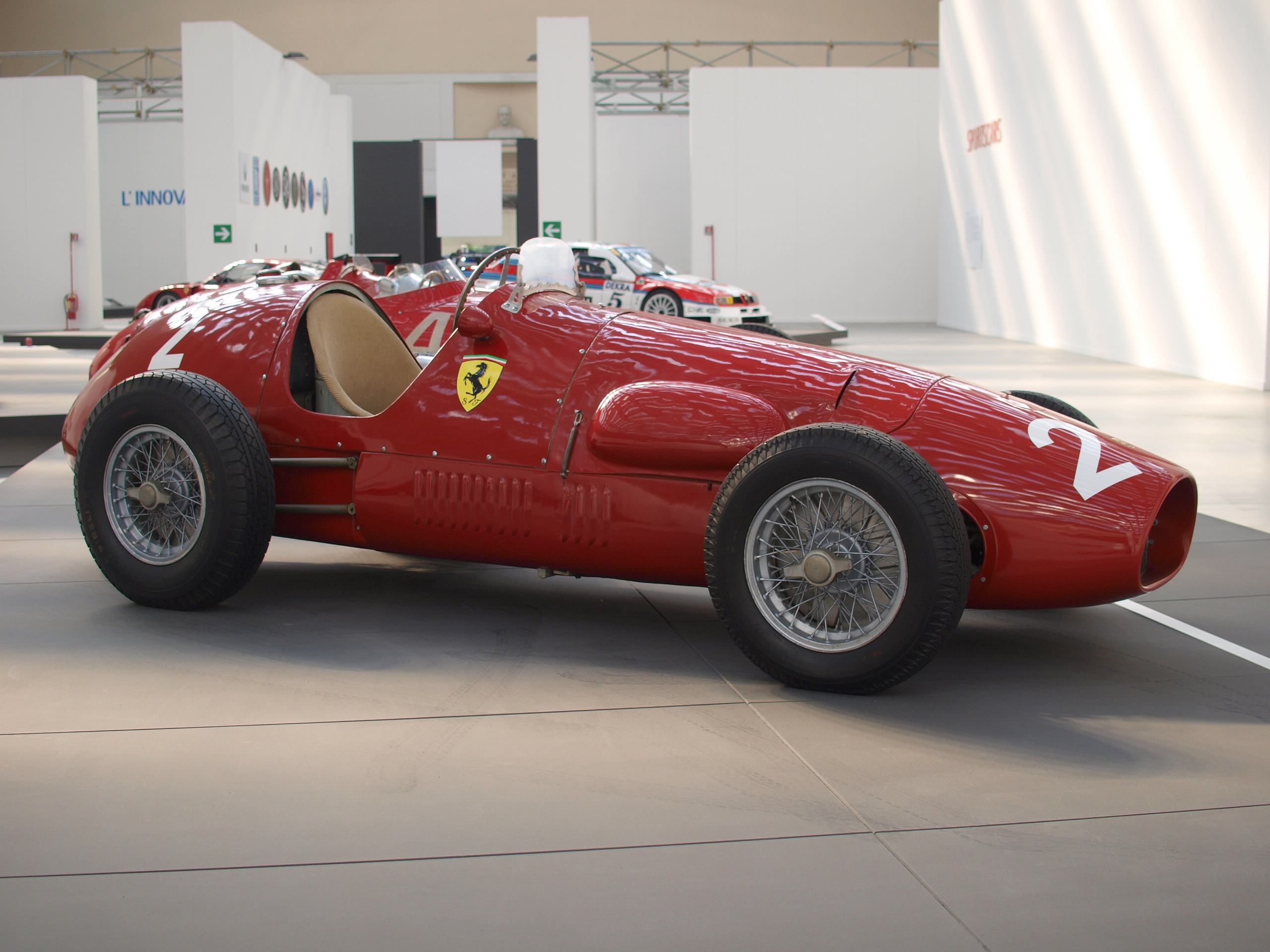 L'evoluzione dell'automobile Ferrari 500 F-2